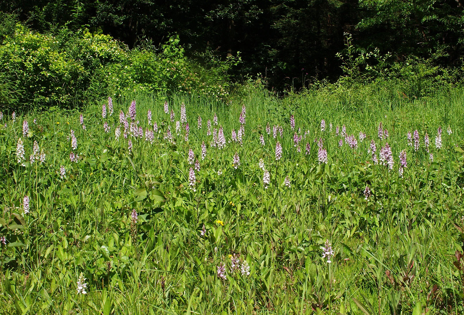 Dactylorhiza fuchsii Schwäbisch-Fränkischer Wald, Germany